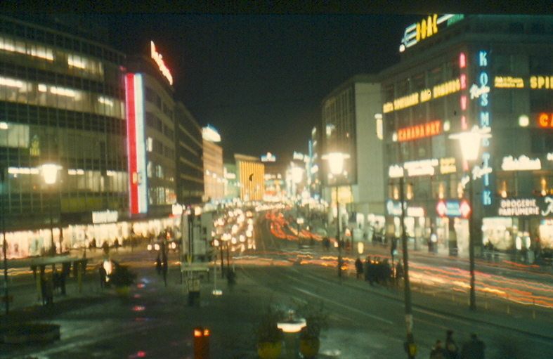 Bildbeschreibung: Zeil bei Nacht um 1970 Quelle: Scan von eigener Aufnahme Fotograf/Zeichner: dontworry Datum: um 1970 Sonstiges: ...